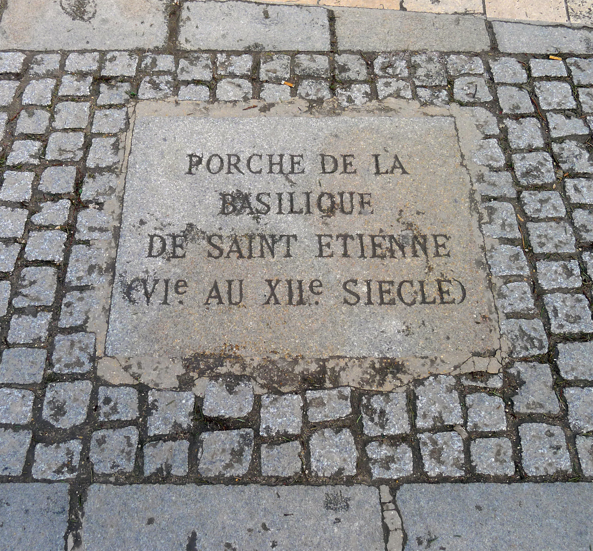 Parvis de Notre-Dame (emplacement du porche de l'ancienne basilique St-Etienne) -Paris IV